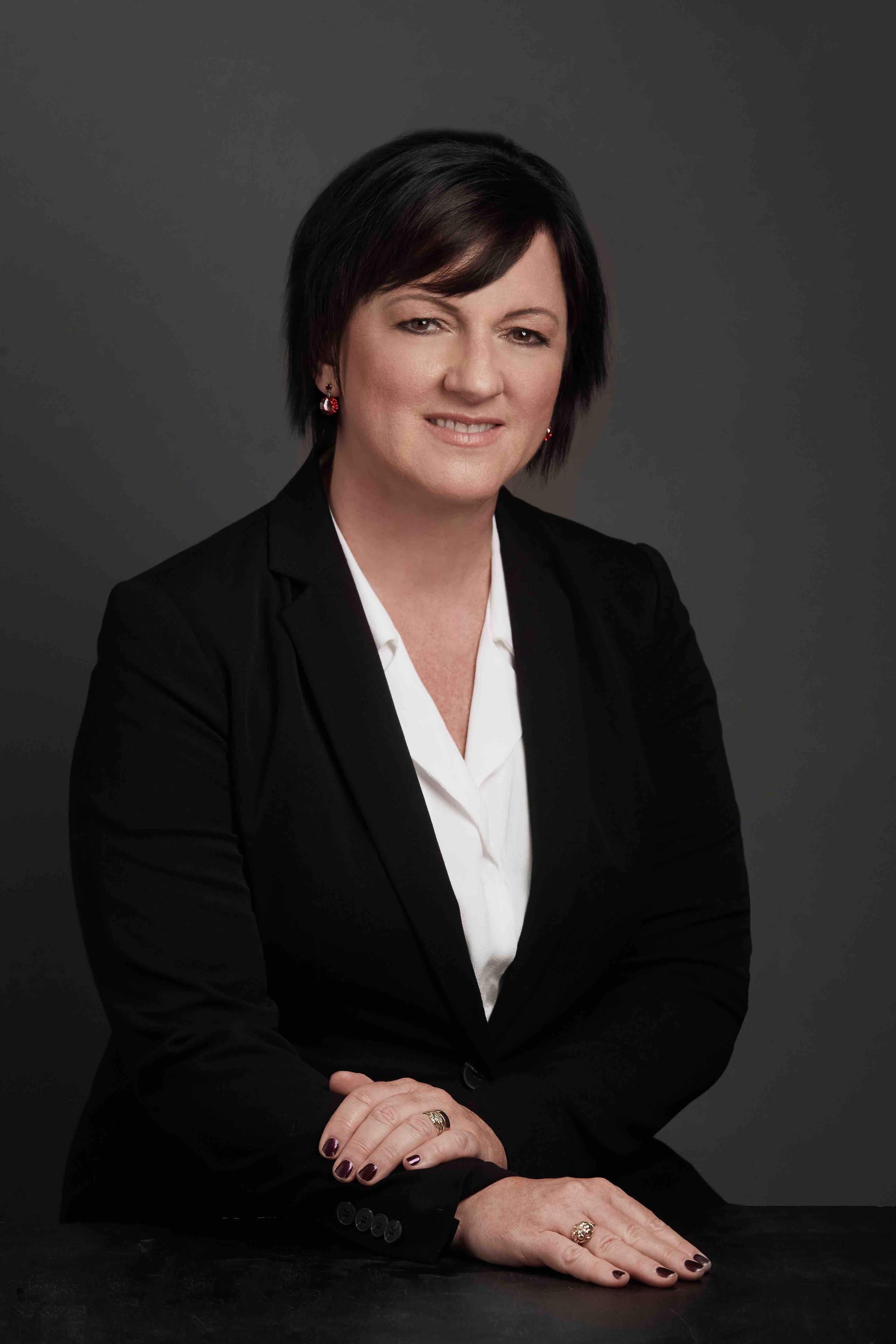 Szemerkényi Réka magyar közgazdász, volt amerikai nagykövet.